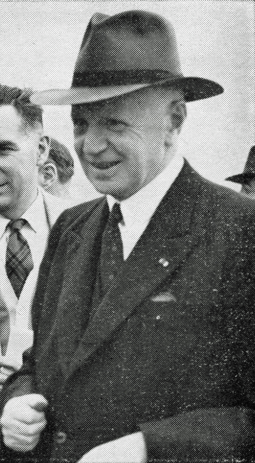 Sveriges ambassadör i Paris, K. Westmann.